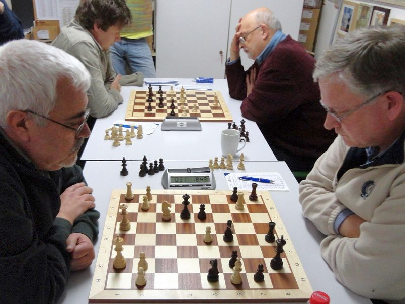 Mannschafts-Vierer-Pokal 2014, Bretter 1 (Skembris - Weidemann) und 2 (Schild - Herbrechtsmeier) gegen SC Emmendingen im Bezirk Freiburg.